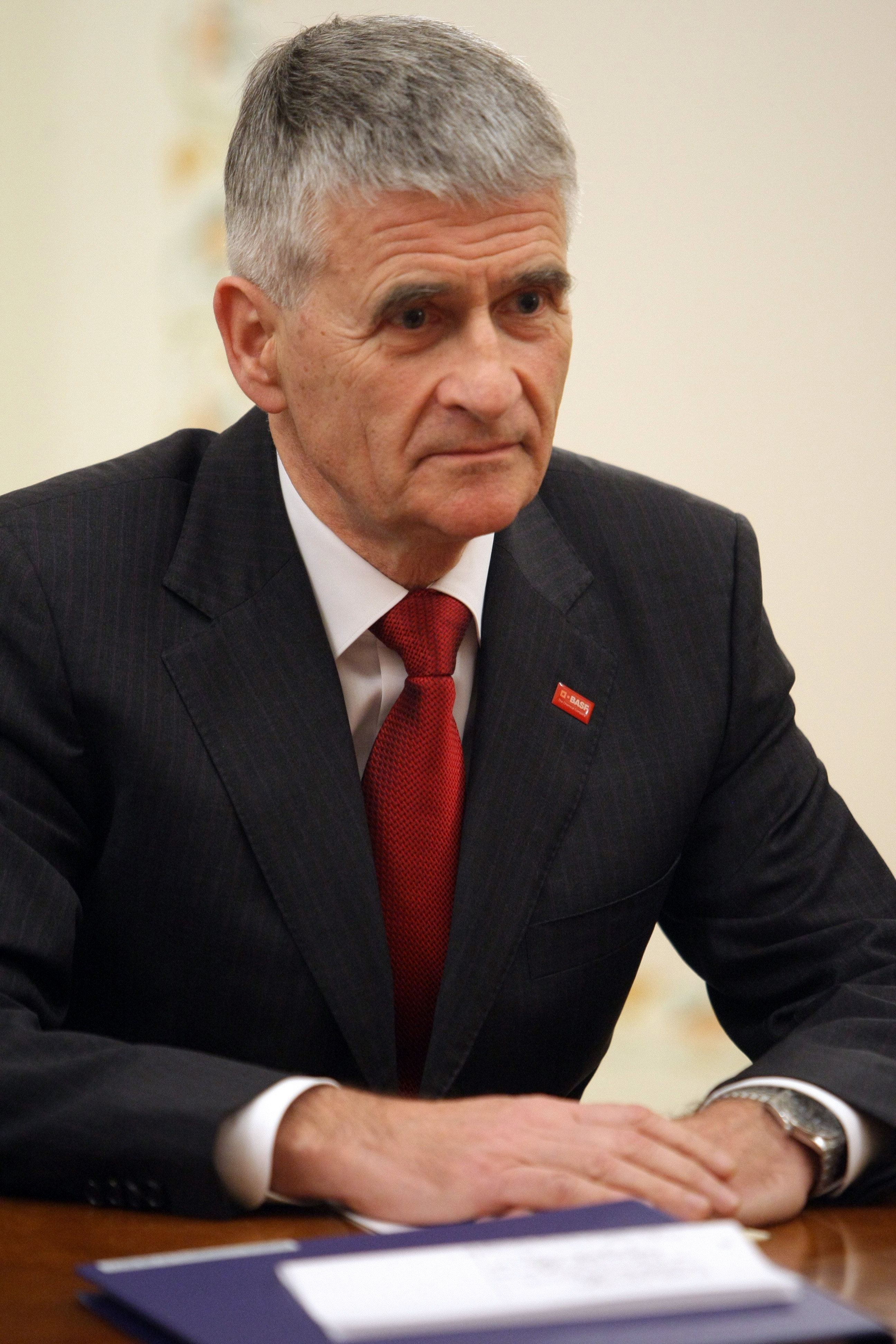 Председатель правления концерна «БАСФ» Ю. Хамбрехт на встрече с Председателем Правительства Российской Федерации В. В. Путиным